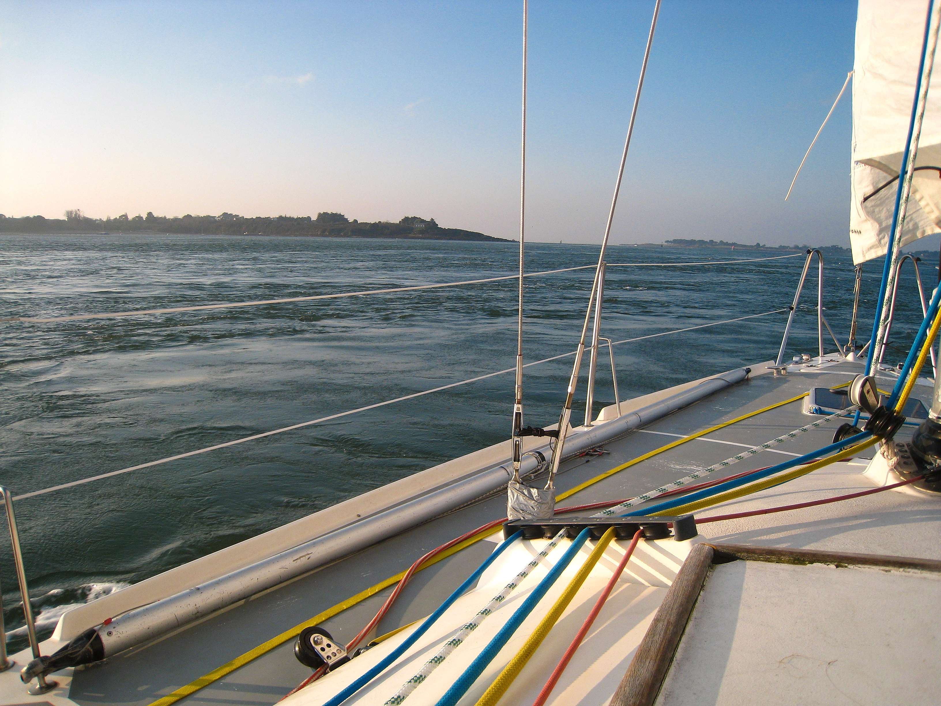 Winter-Törn mit les Glénans: Gezeitenstrom im Ausgang des Golfs von Morbihan